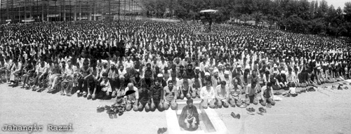 اولین نماز جمعه ایران به امامت آیت الله طالقانی